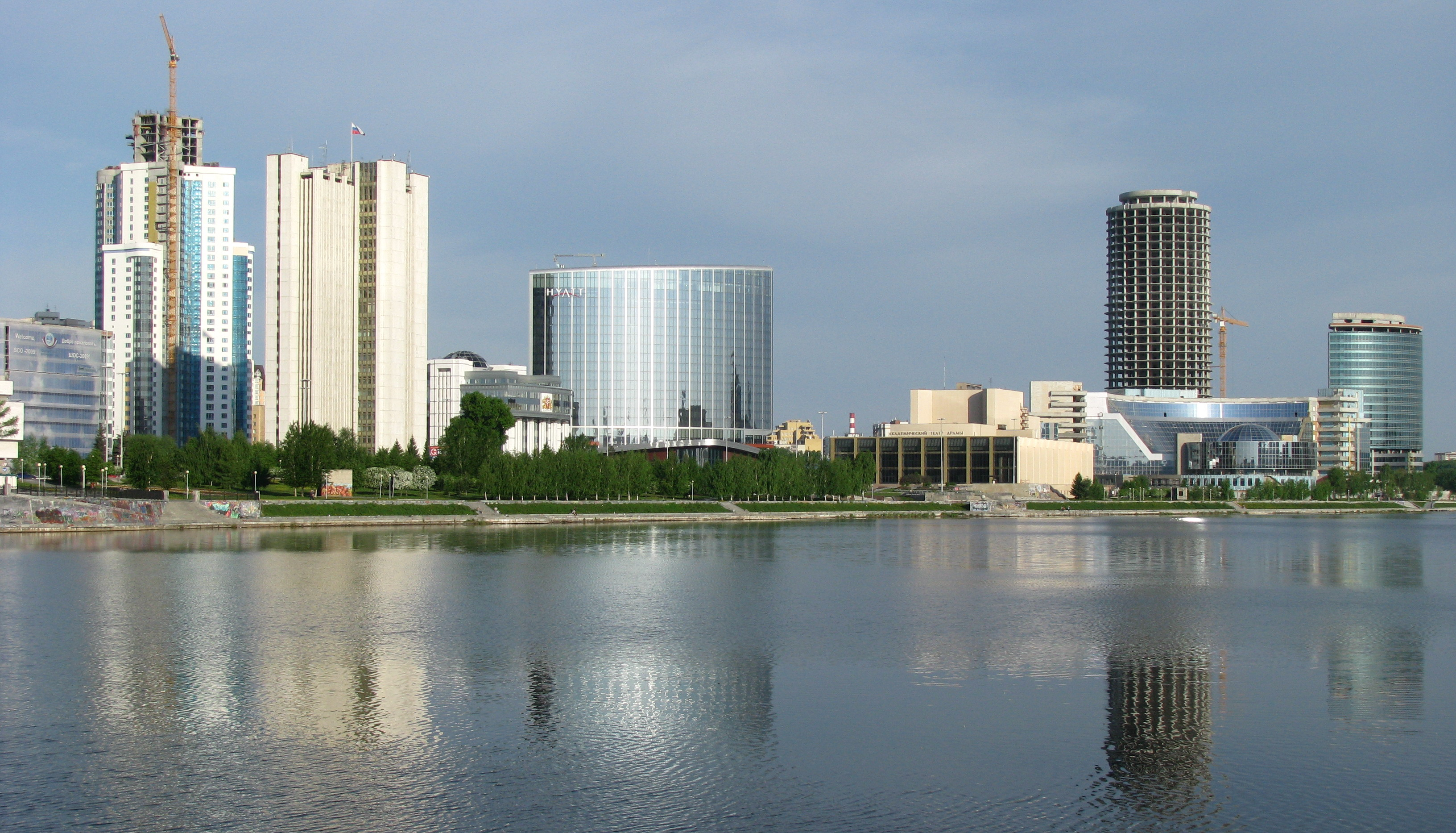 Набережная в центре Екатеринбурга, где планируется строительство Екатеринбург-сити